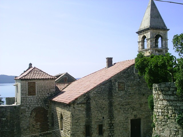 TF2-A0A3